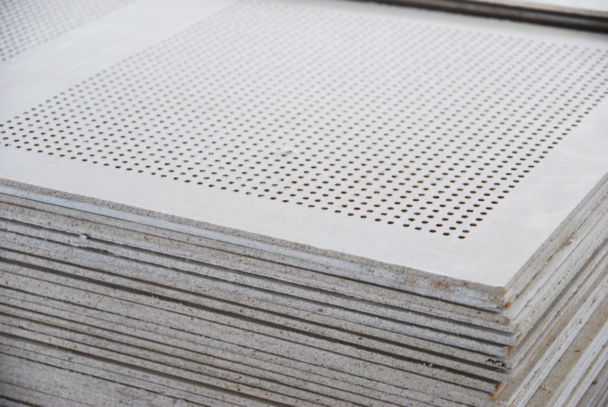 Stos odpowiednio wyprofilowanych płyt MgO